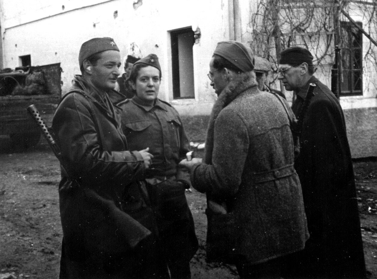 Srpskohrvatski / српскохрватски: Boris Kidrič i Herta Has sa grupom slovenskih vijećnika u Mrkonjić Gradu, u povratku sa II zasjedanja AVNOJ-a u Jajcu, XII 1943.